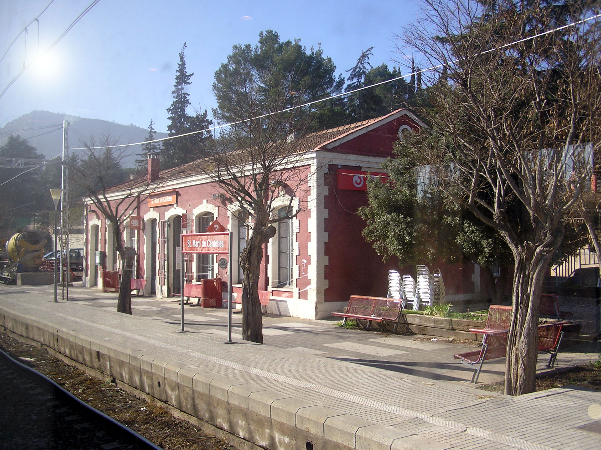 Estación de Sant martí de Centelles.